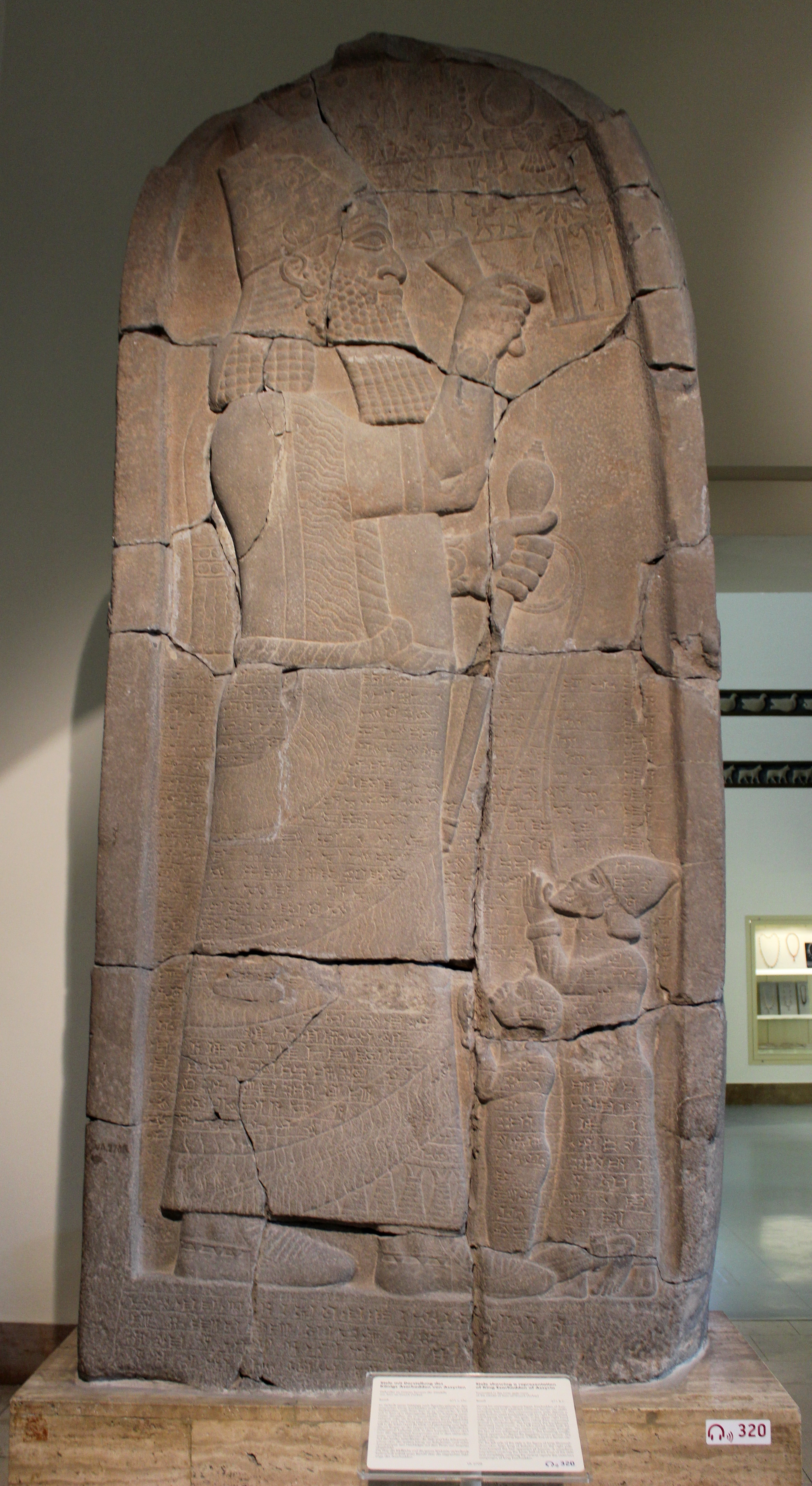 Berlín. Pergamon Museum, estela de Asarhadon. 671 a.C.